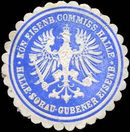 Sealing stamp Title: Kön. Eisenbbahn Commission Halle-Sorau-Gubener Eisenbahn Description: blau, weiß, geprägt Place: Halle size: 4 cm